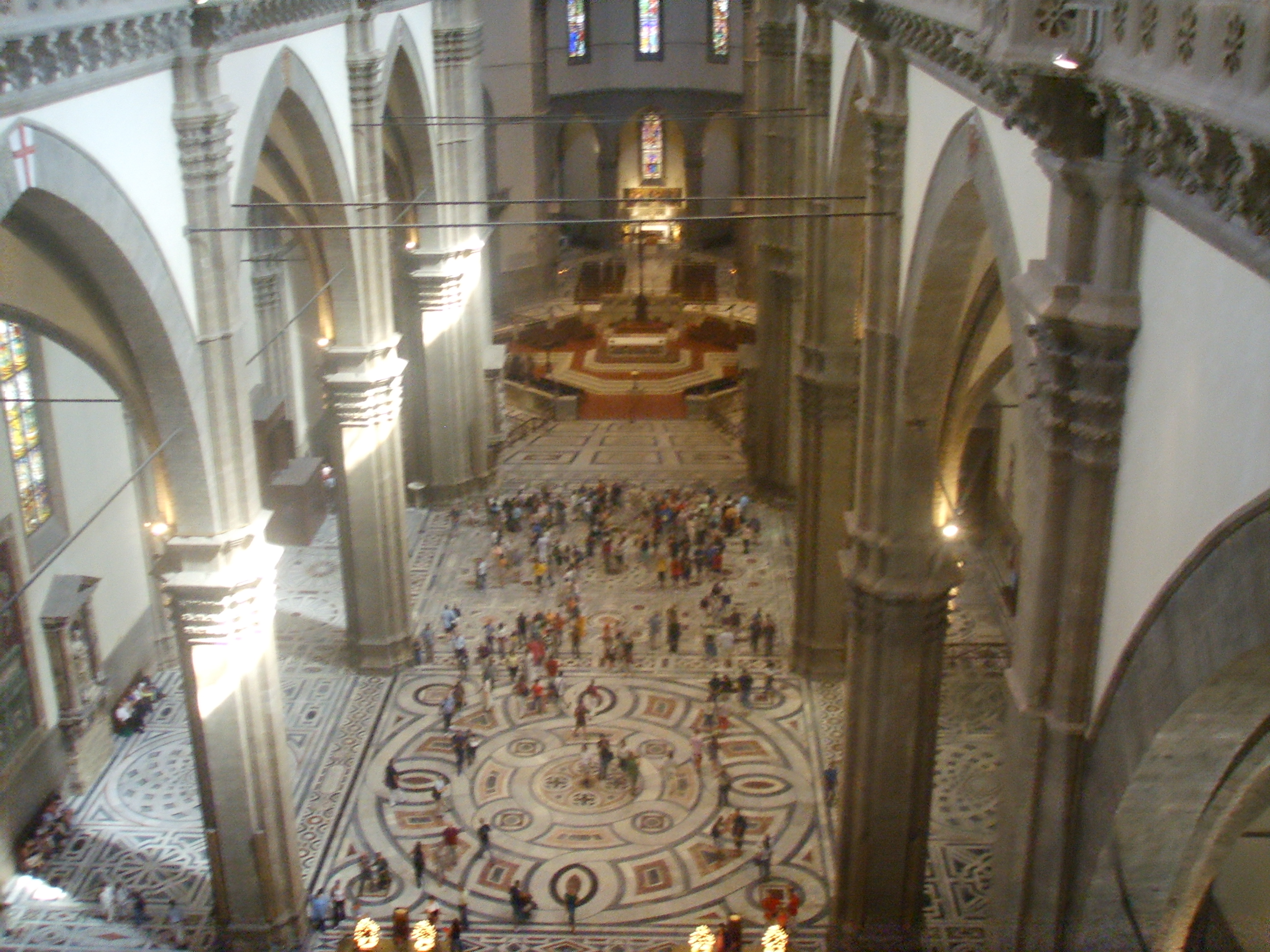 Navata centrale di Santa Maria del Fiore a Firenze.